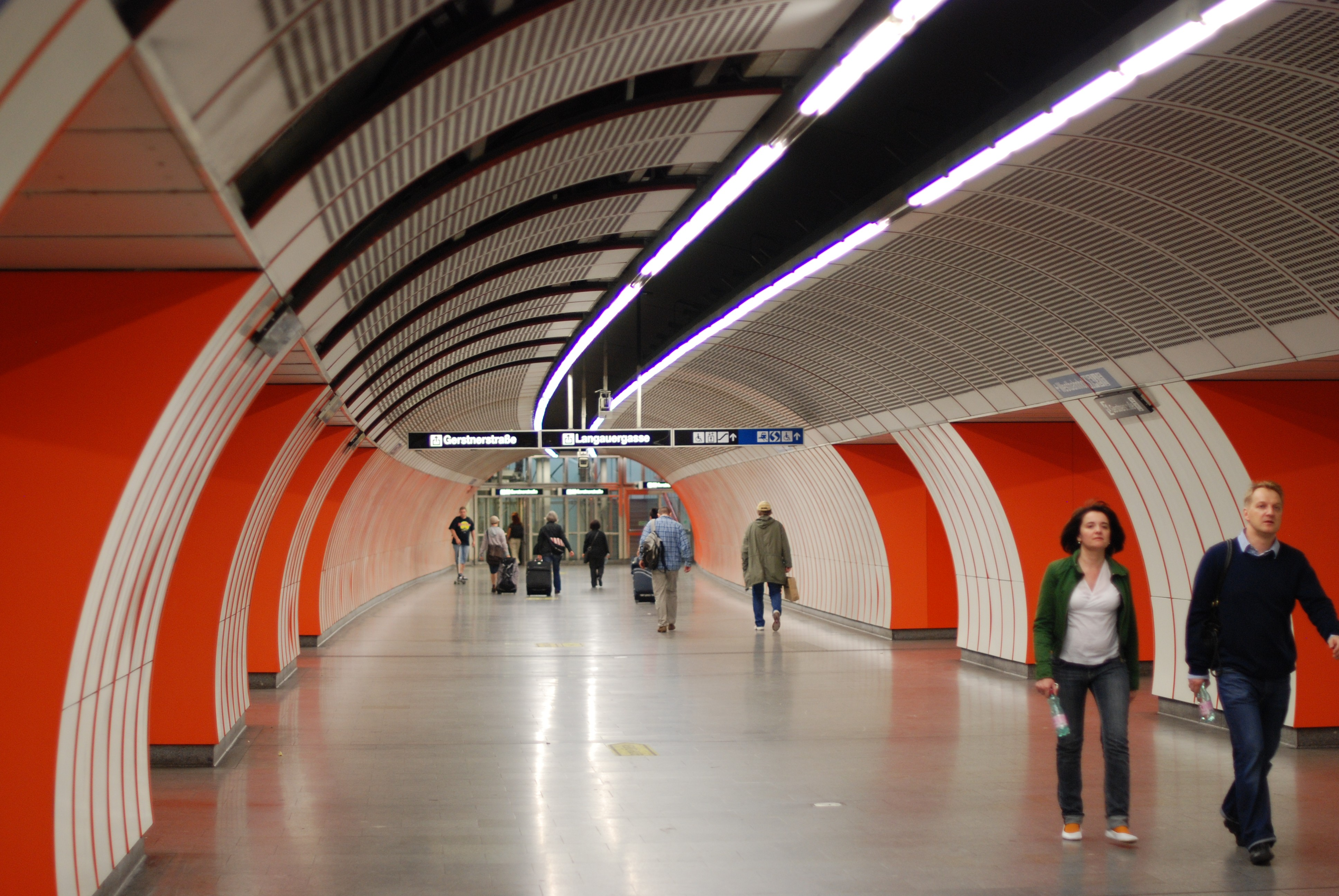 The Viennese underground